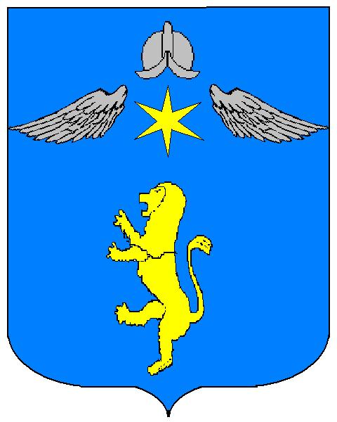 Grb obitelji Tartalja